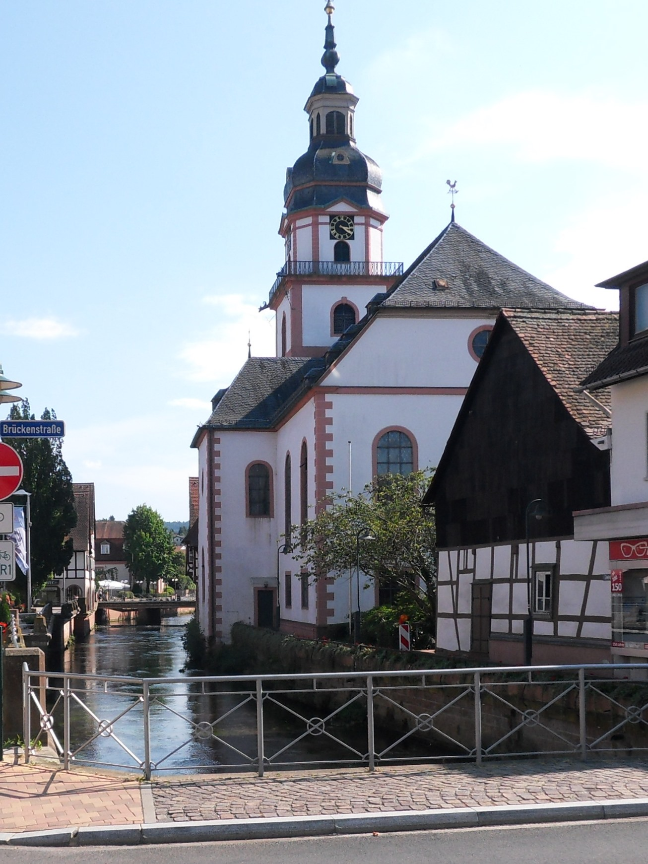 Blick von der Brückenstraße auf die Mümlingseite der Evangelischen Stadtkirche Im Städtel 3 in Erbach (Odenwald)